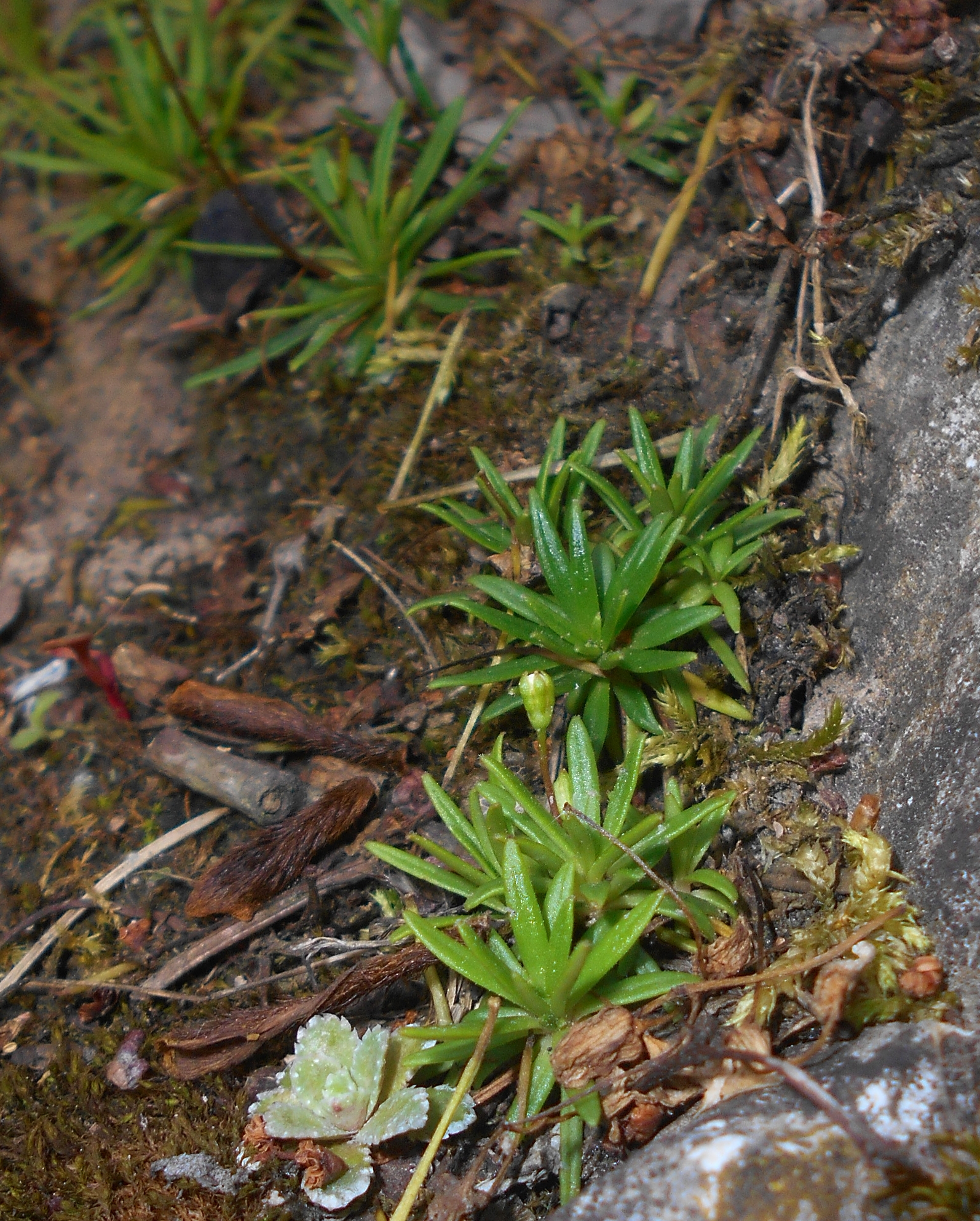 Naradka mlecznobiała (Androsace lactea), Ogród Botaniczny UMCS w Lublinie